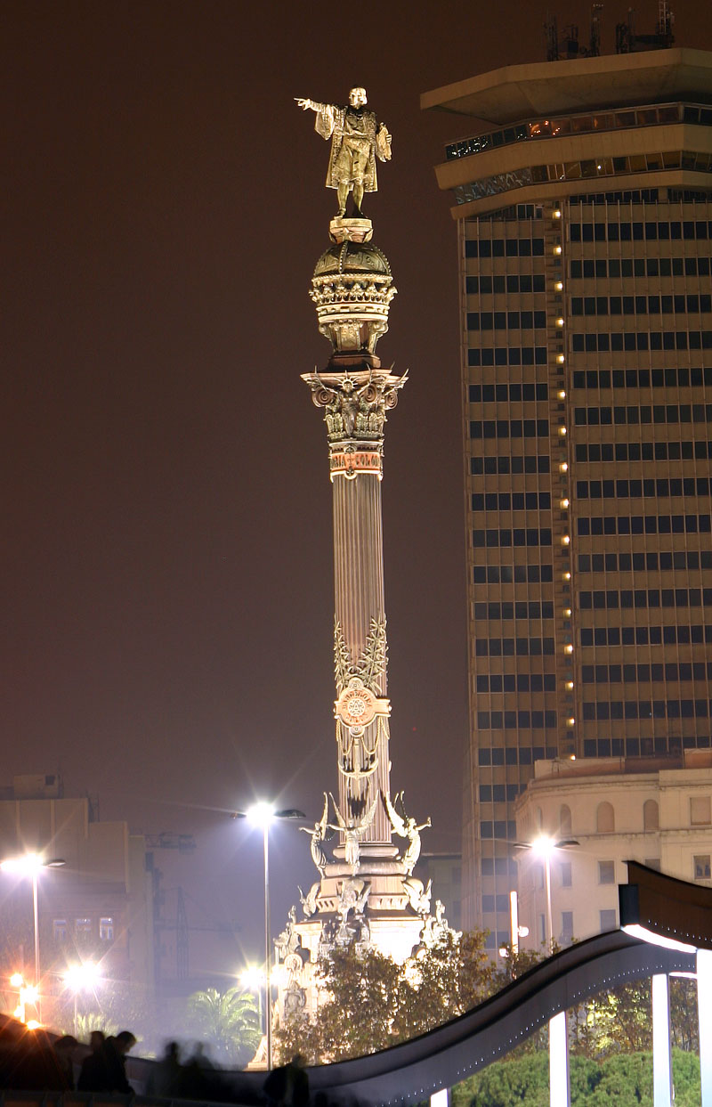 Monumento a Cristobal Colón en Barcelona. Vista nocturna.